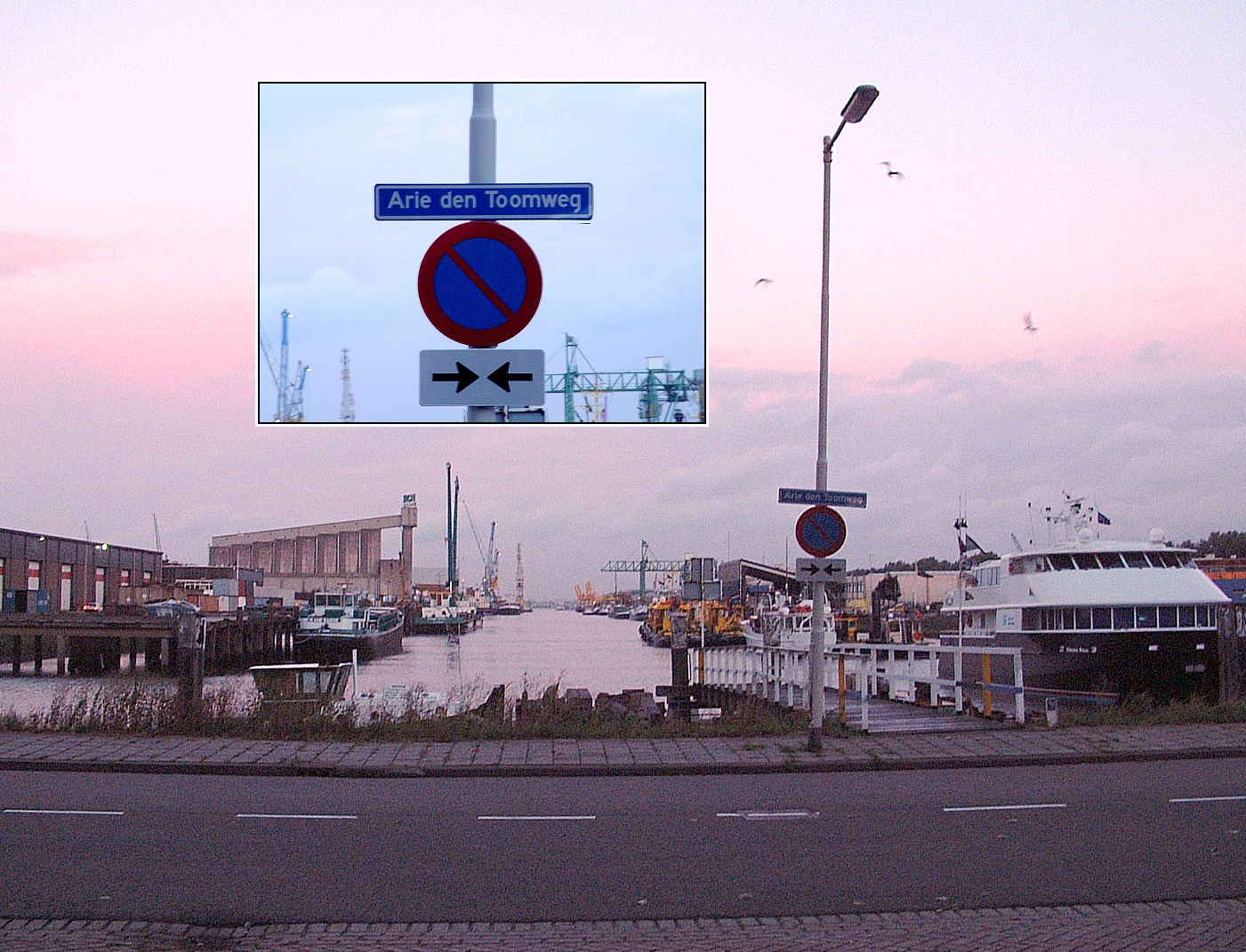 Arie den Toomweg in Rotterdam Heyplaat